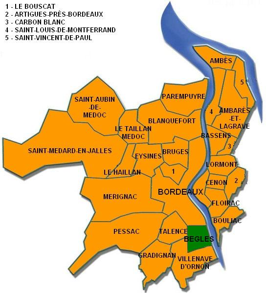 Carte des communes de la CUB Map of the communes in the Urban Community of Bordeaux Historique de l'image * 9 février 2006 à 23:52 . . Ludo33 (Discuter | Contributions | Bloquer) 544×599 (124 665 octets) (Carte des communes de la CUB)